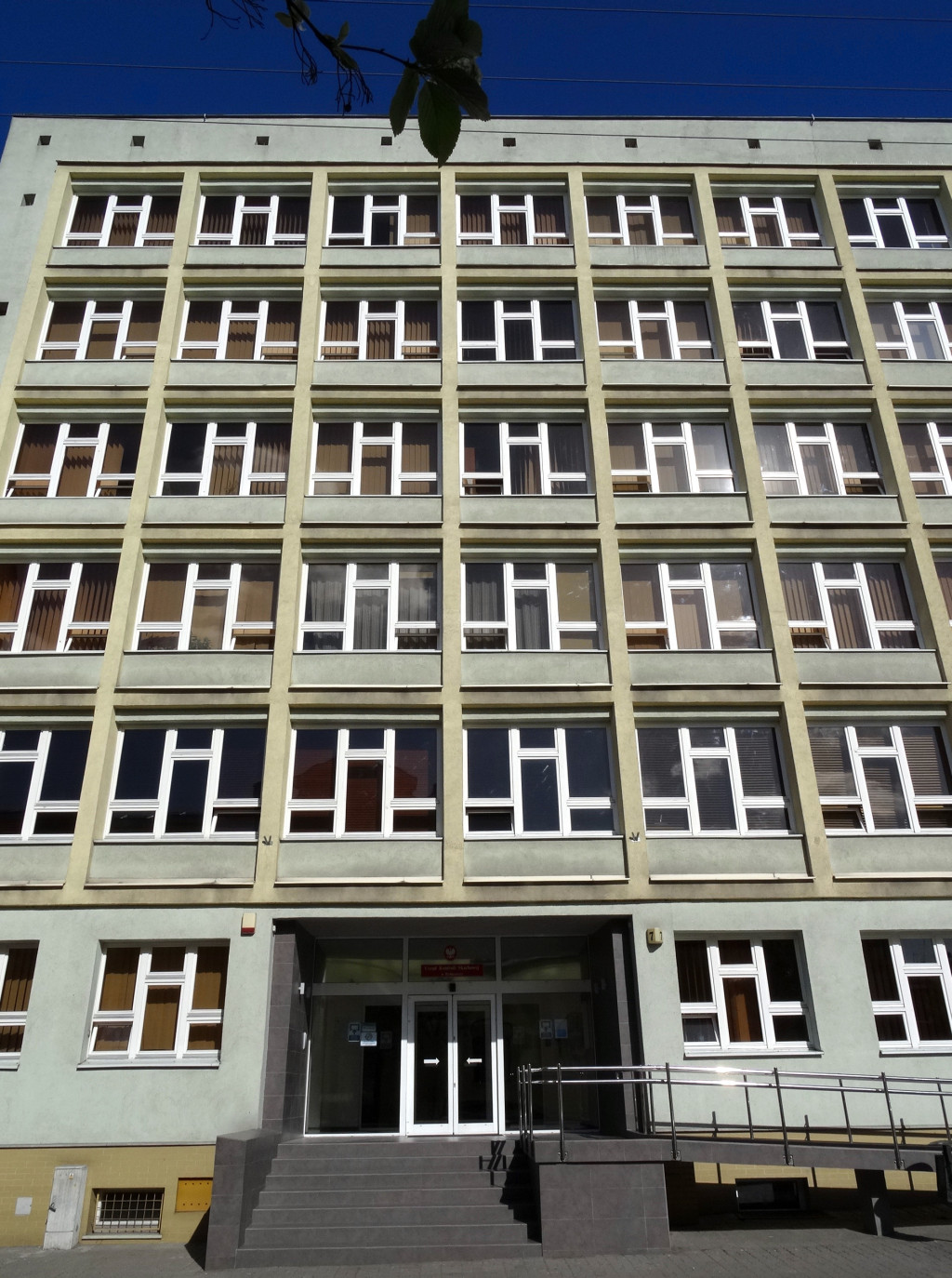 Urząd Kontroli Skarbowej przy ul. Marcinkowskiego 7 w Bydgoszczy